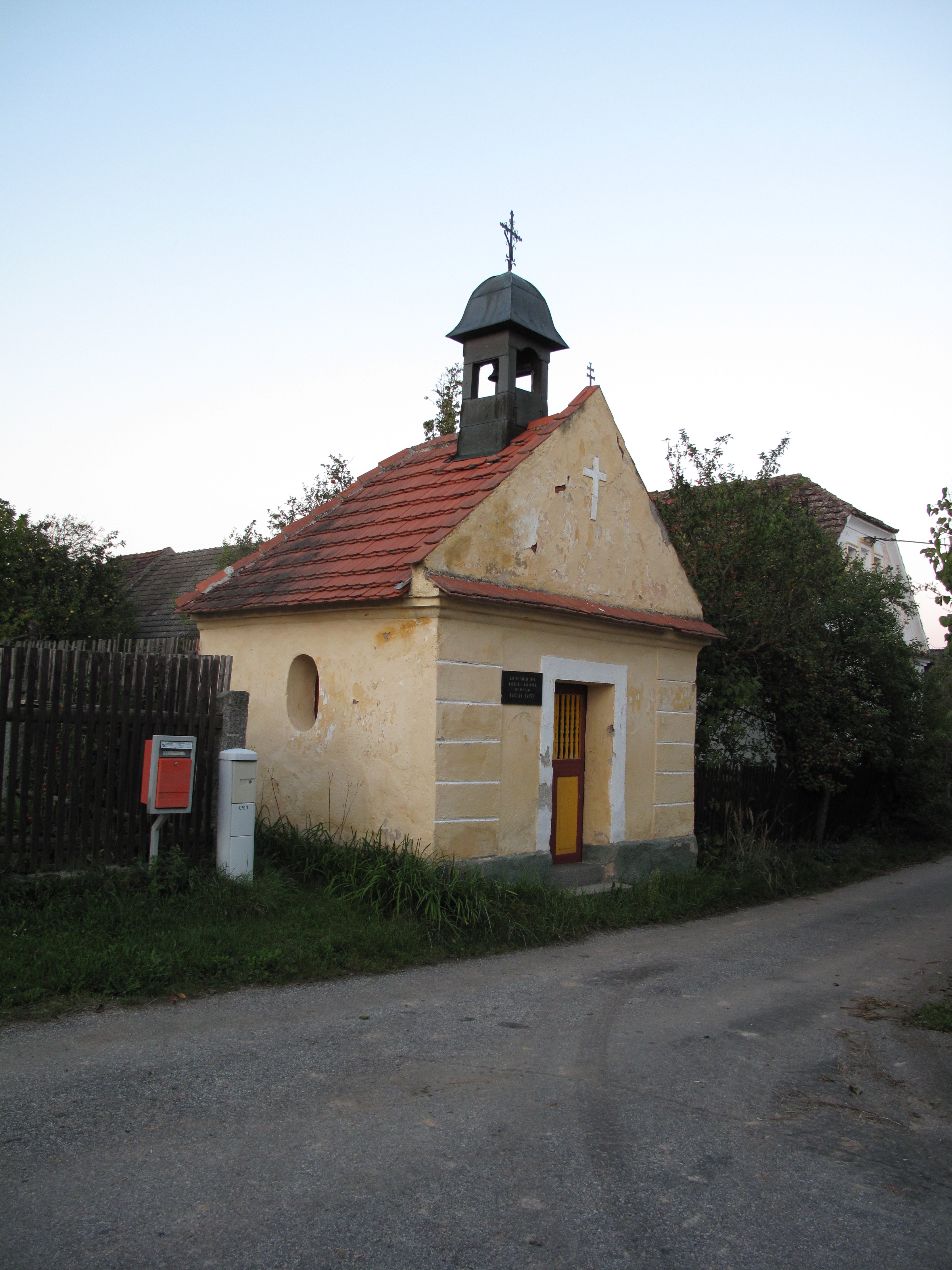 Kaplička ve Václavově. Okres Strakonice, Česká republika.